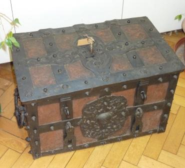 Die "Rote Lade": Mittelalterliche Archivtruhe im Stadtarchiv Speyer